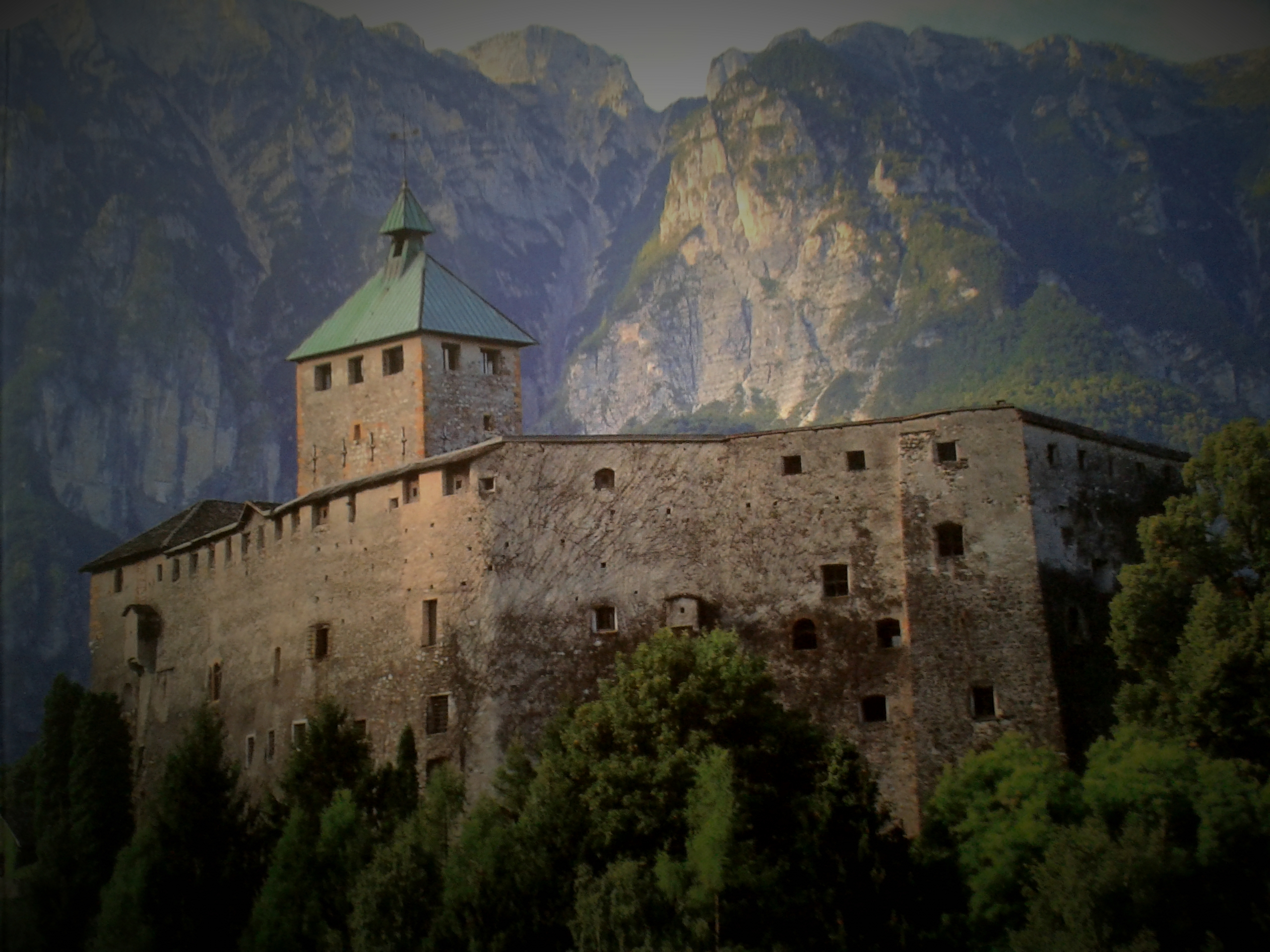 Castel Ivano, Ivano Fracena, Italy